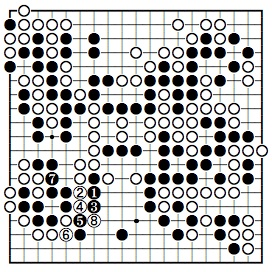 第7期本因坊戦挑戦手合七番勝負第1局 1952年6月25-26日 本因坊昭宇-高川格(先番) 195-202手目